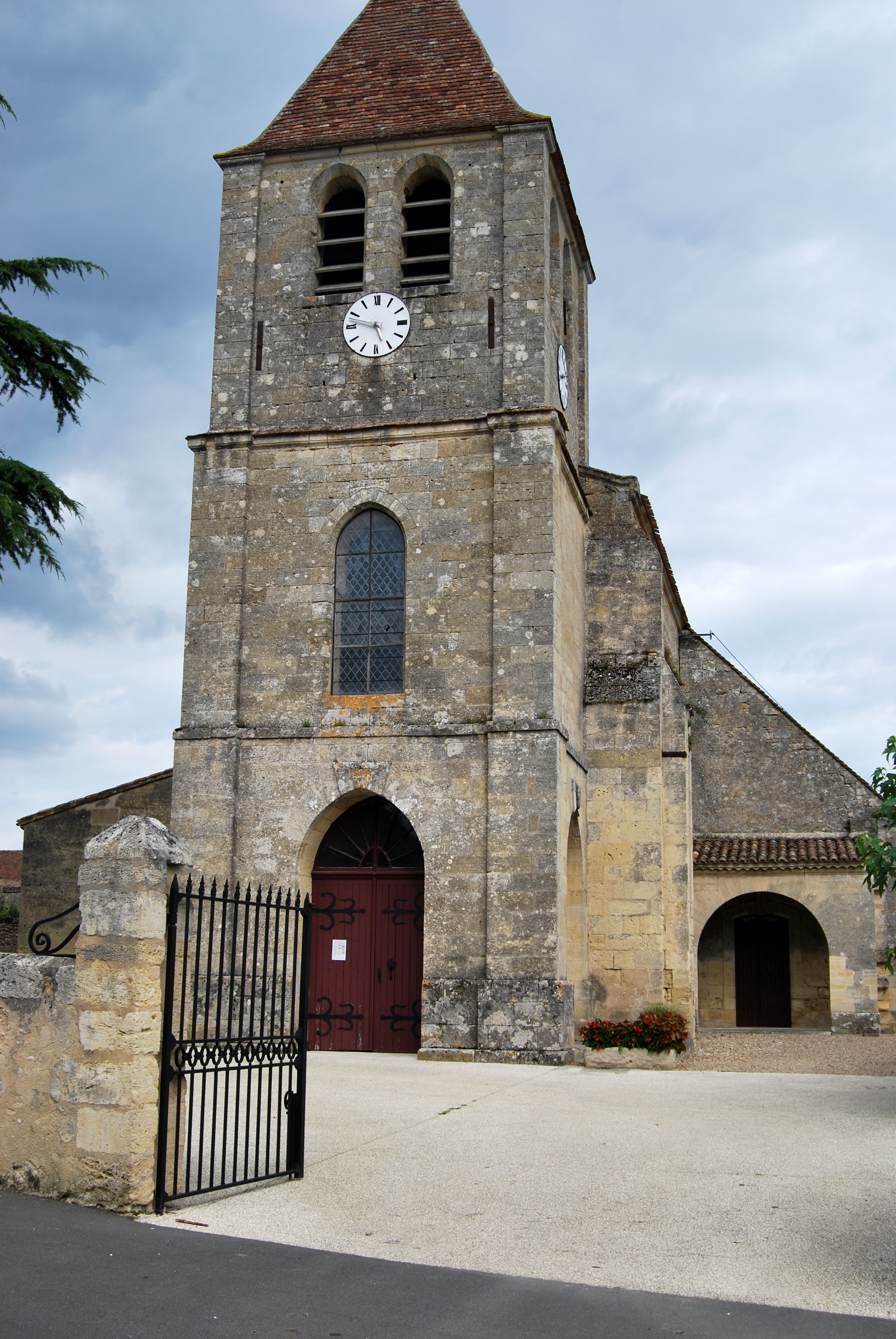 Église de Saint-Magne-de-Castillon